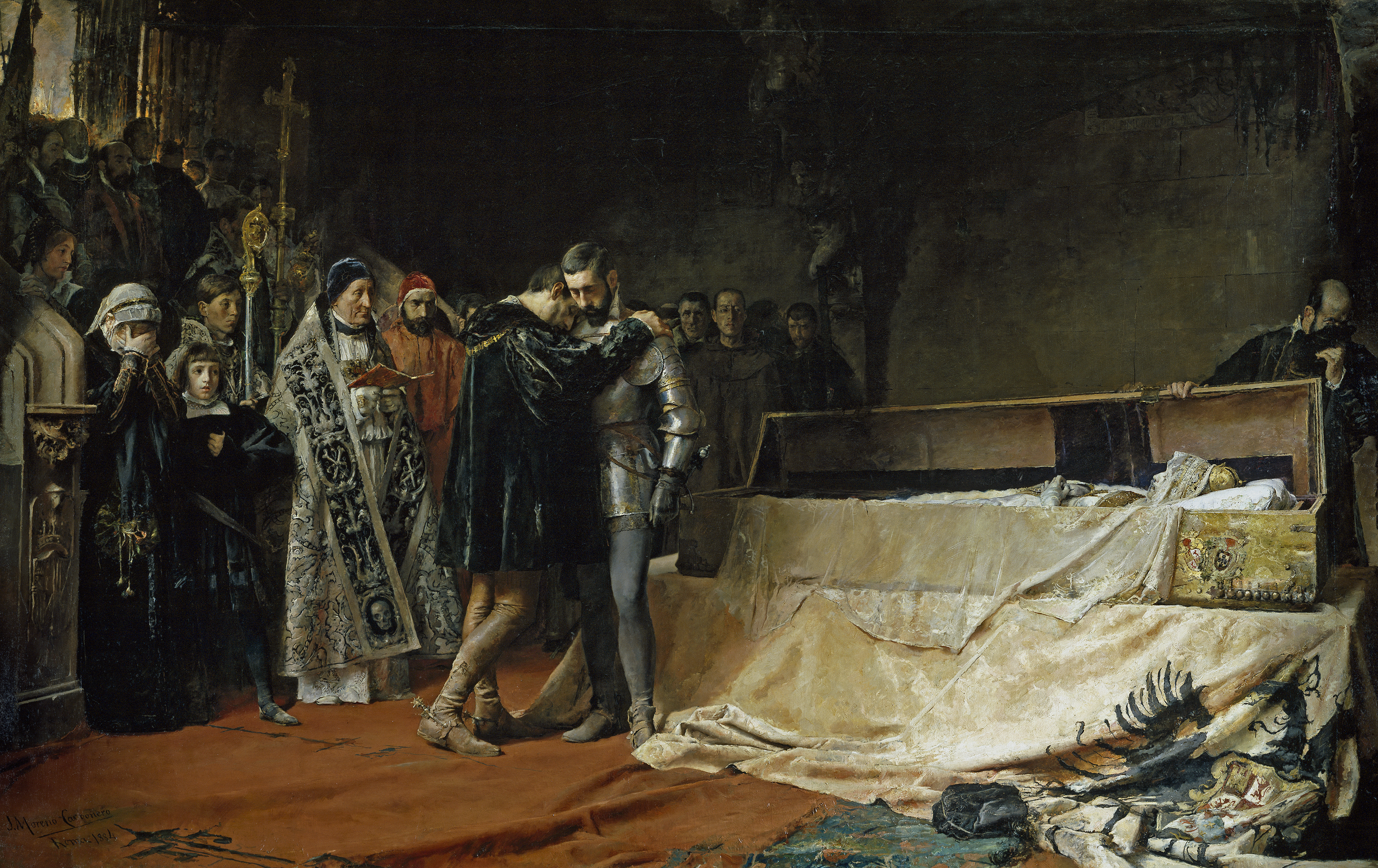 La obra representa la conversión de San Francisco de Borja (1510-1572), marqués de Lombay y luego IV duque de Gandía, tras contemplar el cadáver putrefacto de la emperatriz Isabel de Portugal, esposa del emperador Carlos I de España. La emperatriz falleció en Toledo el día 1 de mayo de 1539, siendo su cadáver trasladado a Granada, ciudad en la que se desarrolló la escena representada en el cuadro. Cuando el duque contempló que el cadáver de la emperatriz, cuya belleza había cautivado a toda la Corte castellana, se había descompuesto por causa del calor del viaje, el noble se decidió a «Nunca más, nunca más servir a señor que se me pueda morir», ingresando pocos años después en la Orden de los jesuitas, fundada pocos años atrás por San Ignacio de Loyola y de la que llegaría a ser general.